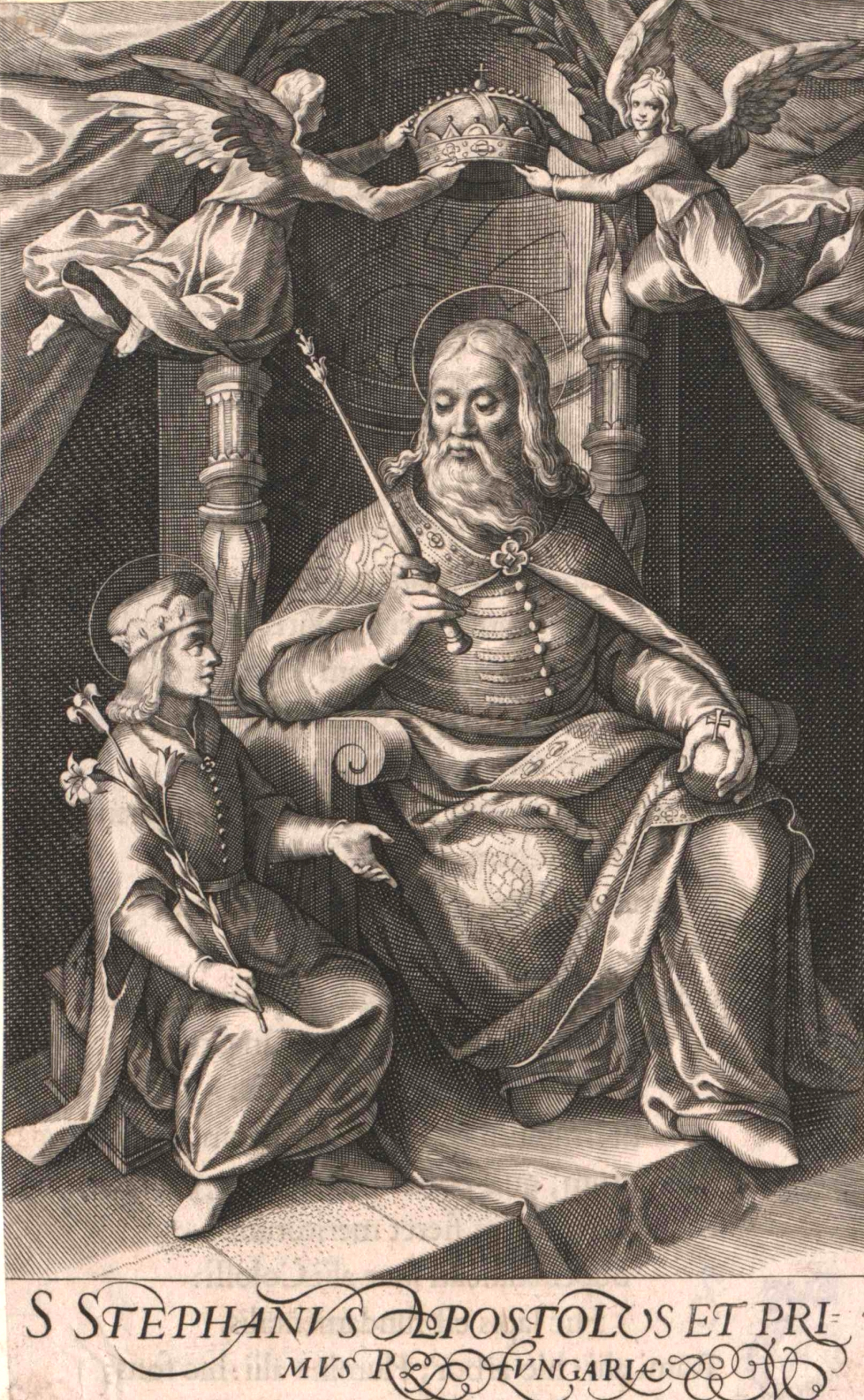 Stephan I. der Heilige, König von Ungarn